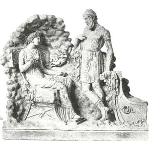 Η Καλυψώ υποδέχεται τον Οδυσσέα.